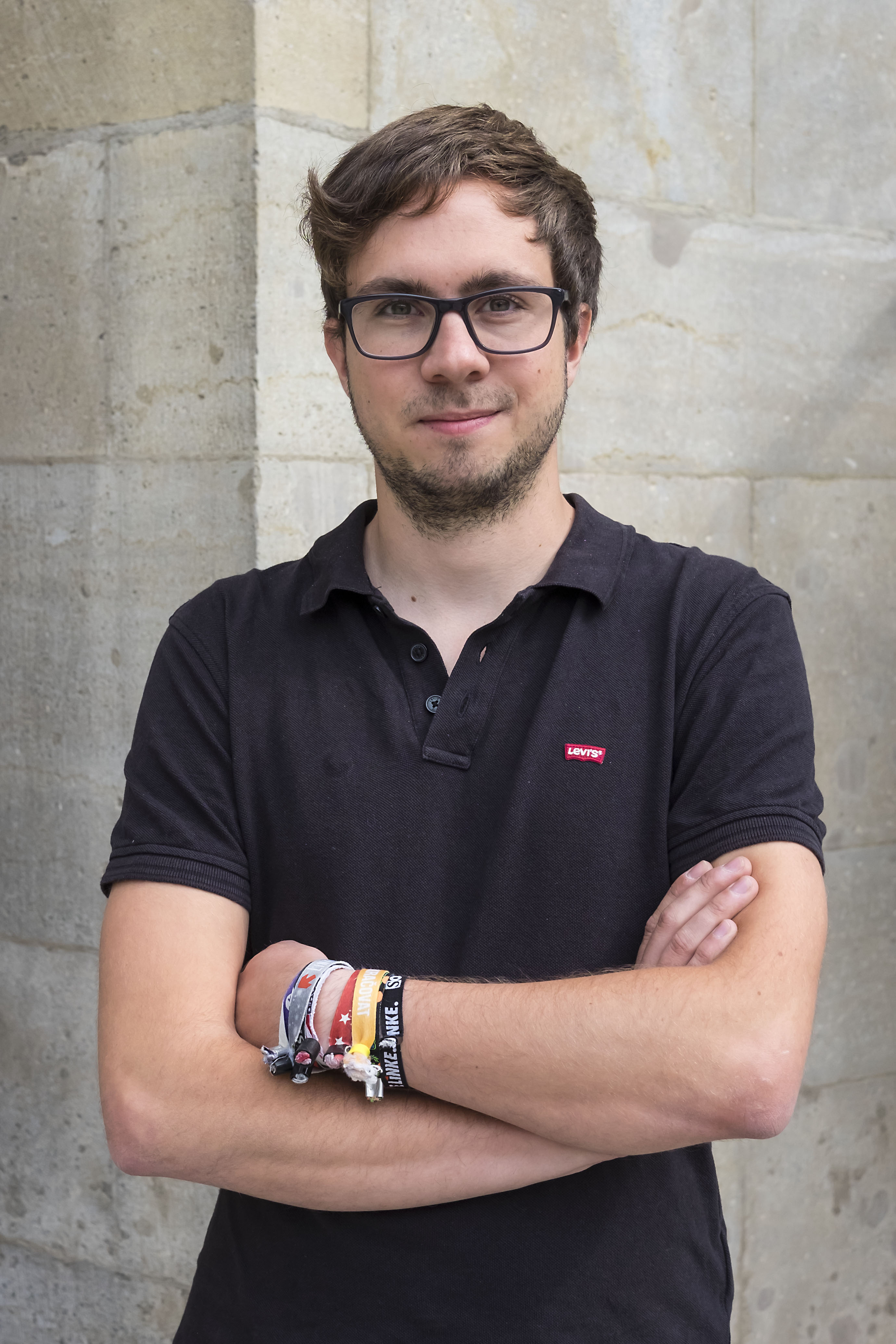 Michael Neuhaus, Pressefoto